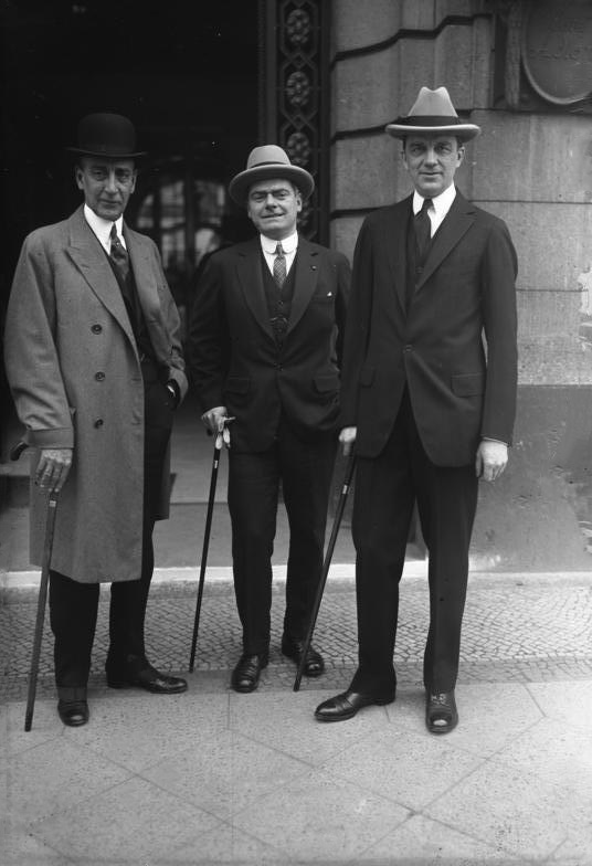 Owen Young, der Generalagent der Reparationsfrage und der Bruder des Generals "Rufus Gutten" - Dawes in Berlin, wo sie wichtige Besprechungen mit Vertretern der Reichsregierung über die Reparationsfragen hatten.